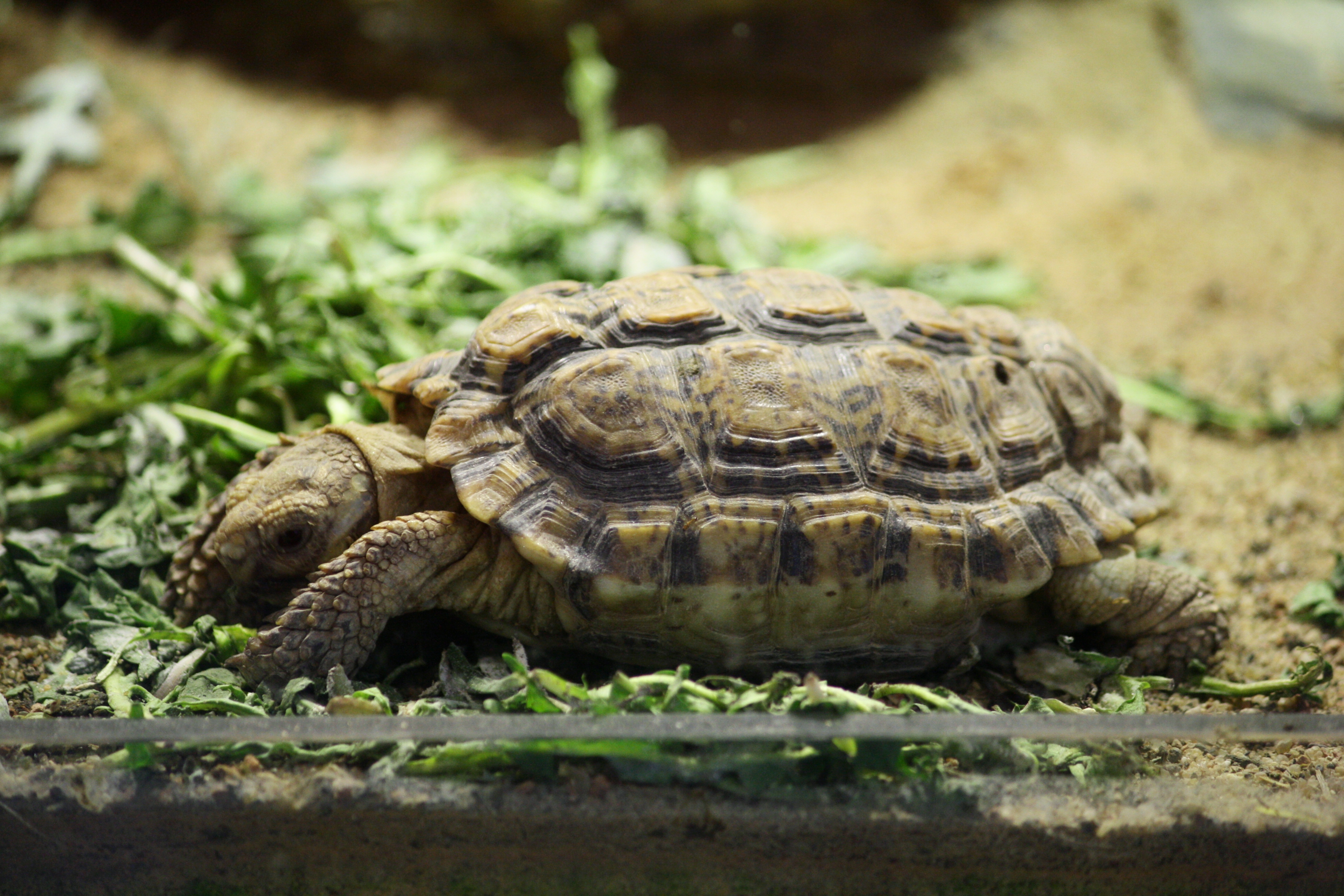 Zoo Praha